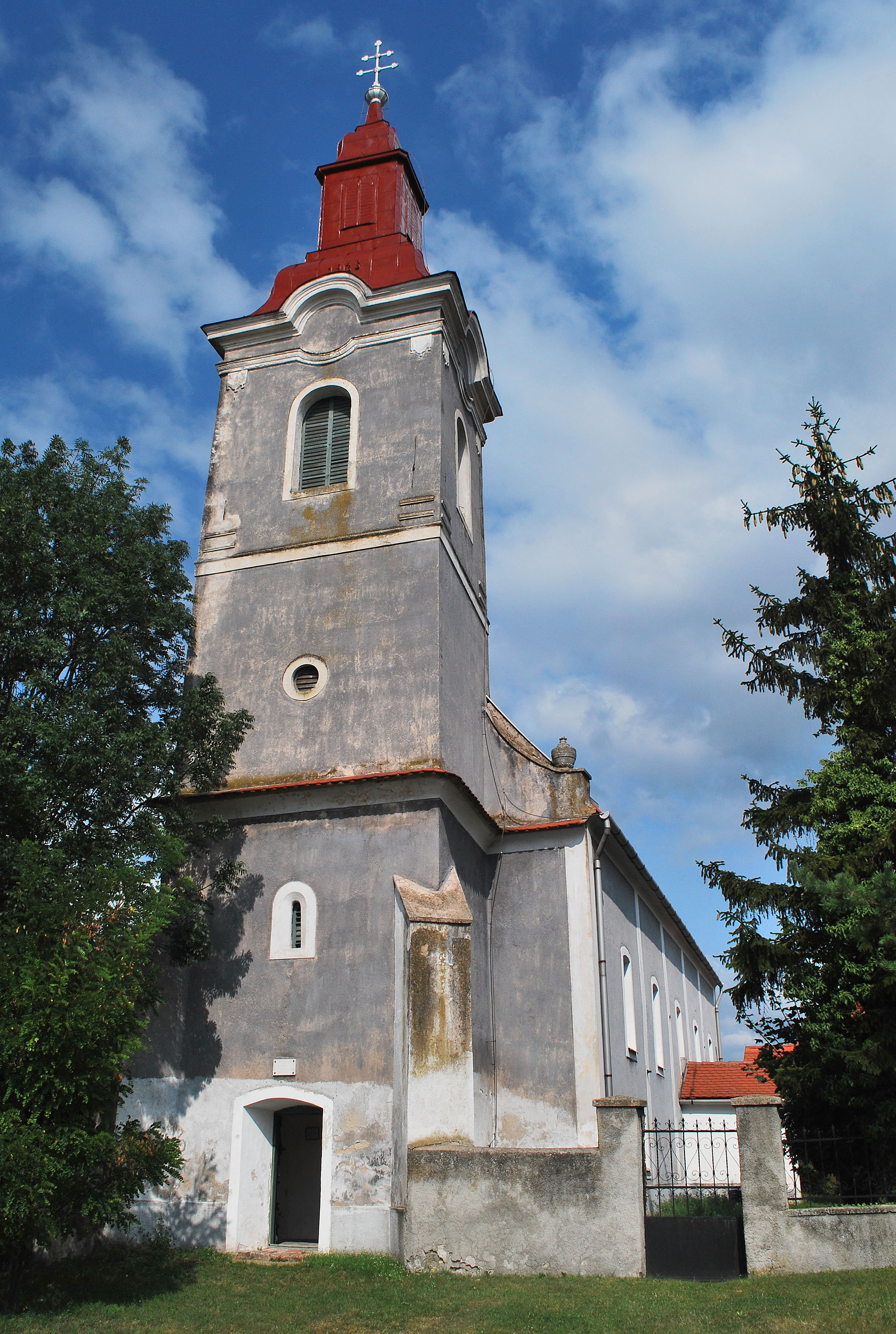 Mencshelyi evangélikus templom (Veszprém megye)